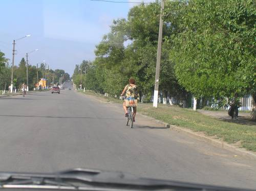 Улица Ленина - главная улица Снигиревки